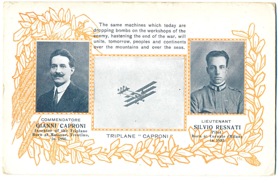 Cartolina pubblicitaria con foto del triplano Caproni affiancato dai ritratti di Gianni Caproni e del capitano Silvio Resnati, 1915 ca (Archivio privato)